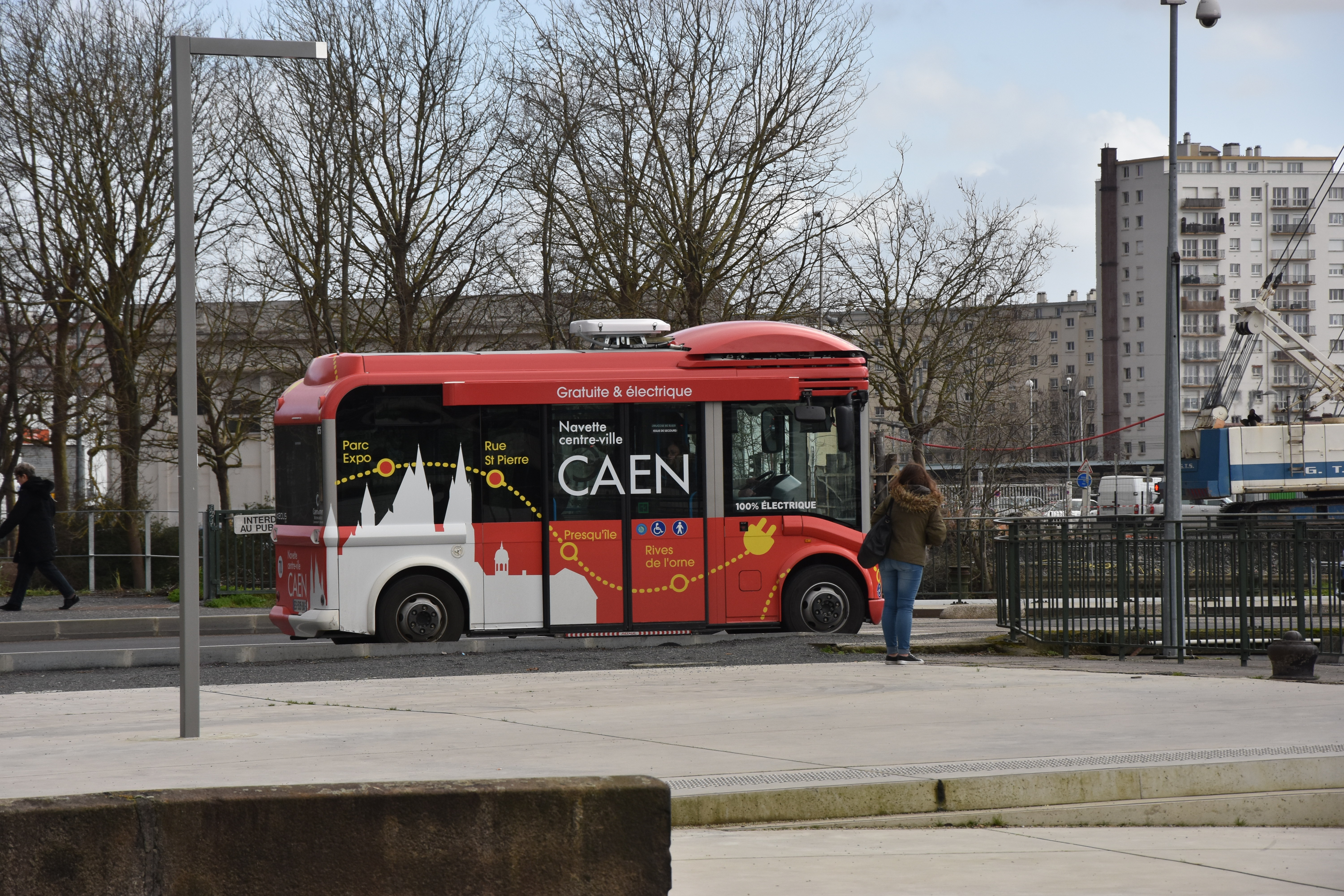 Navette électrique dans le centre ville de Caen